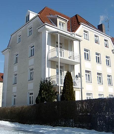 Arthur-Piechler-Straße 6, ehemaliges Wohnhaus der Augsburger Kammgarnspinnerei